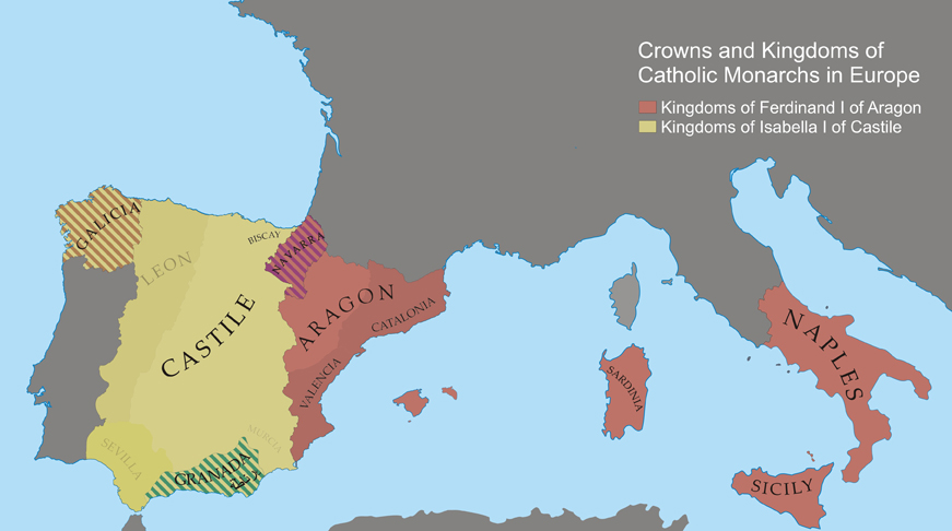 Mapa histórico que recolle os territorios e reinos en posesión dos Reis Católicos arredor do ano 1500. Destacan raiados ultimos reinos sometidos ou anexionados polos monarcas castelán-aragoneses.